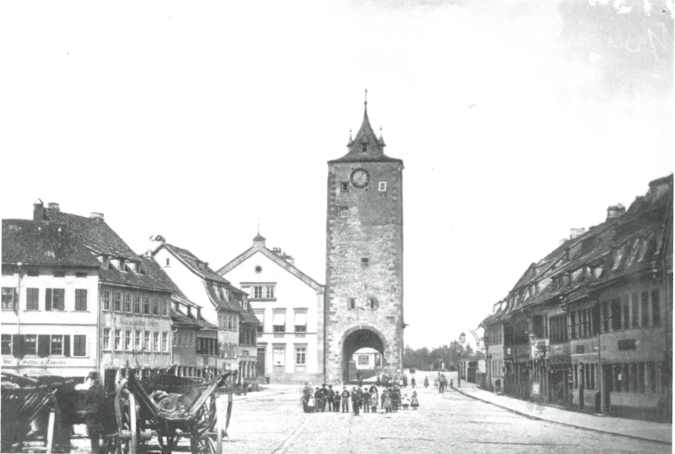 Schweinfurt: Obertorturm von der Stadtseite aus. Aufgenommen vor 1872.